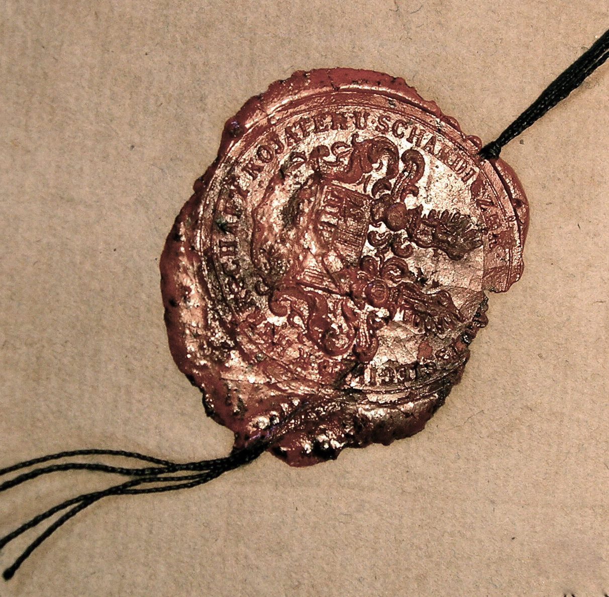 Detail pečeti hospodářské správy statku Bohdalice v Kojátkách 1836 .